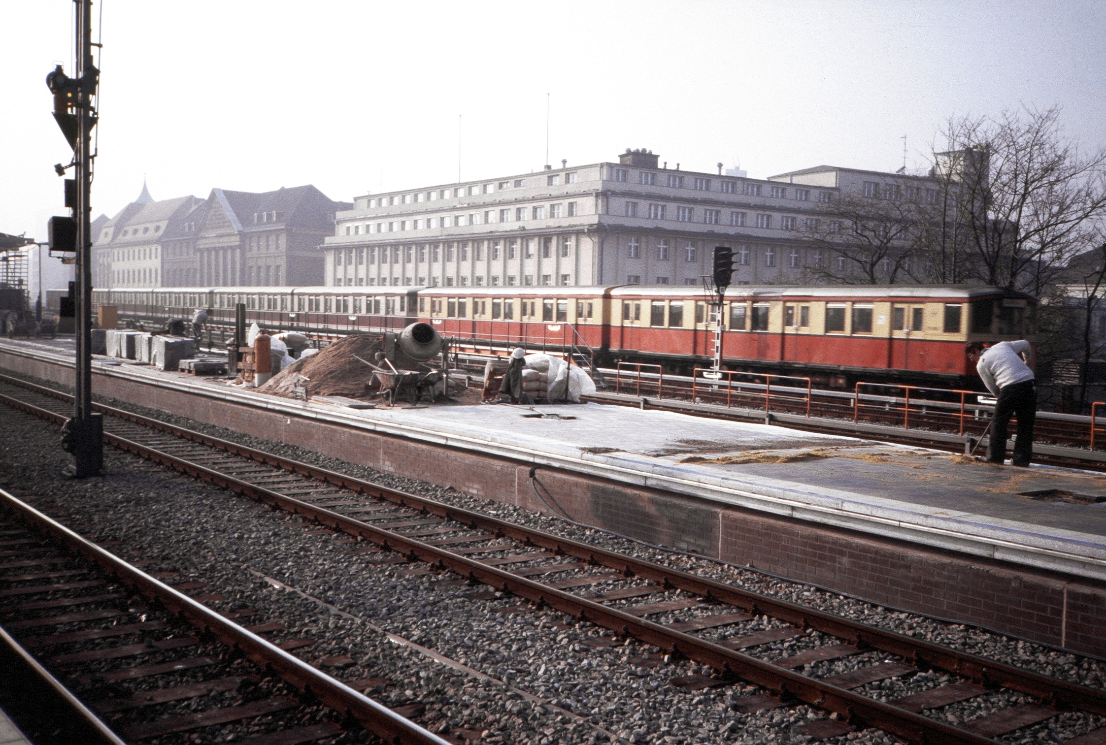 S-Bahn-Zug aus BVG- und DR-Wagen am Bahnhof Zoologischer Garten in Berlin